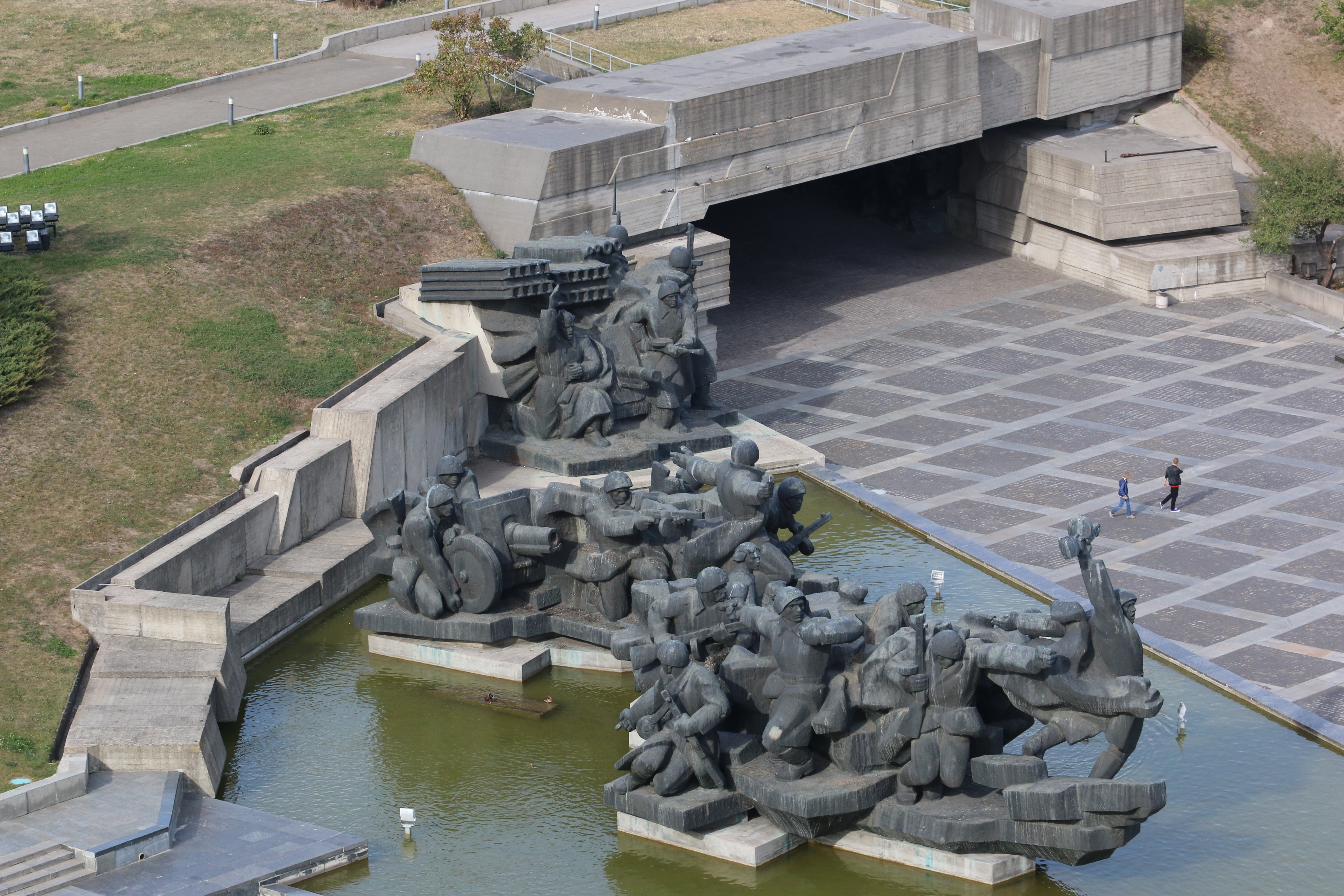 Одна из достопримечательностей города Киева, расположенная на территории Музея истории Украины во Второй Мировой войне.